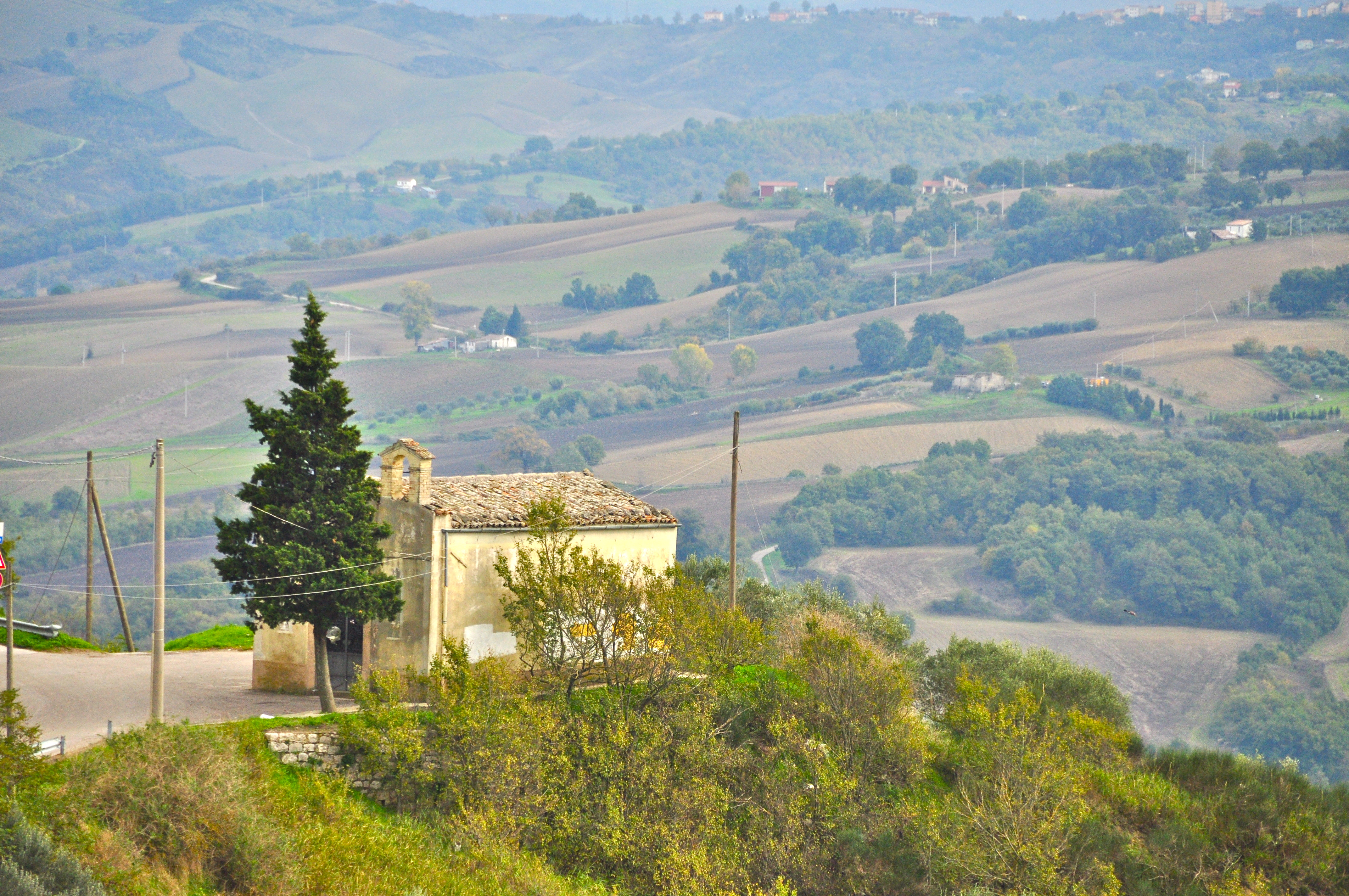 La piccola chiesa di Santa Lucia sita in Calitri, Campania, Italia